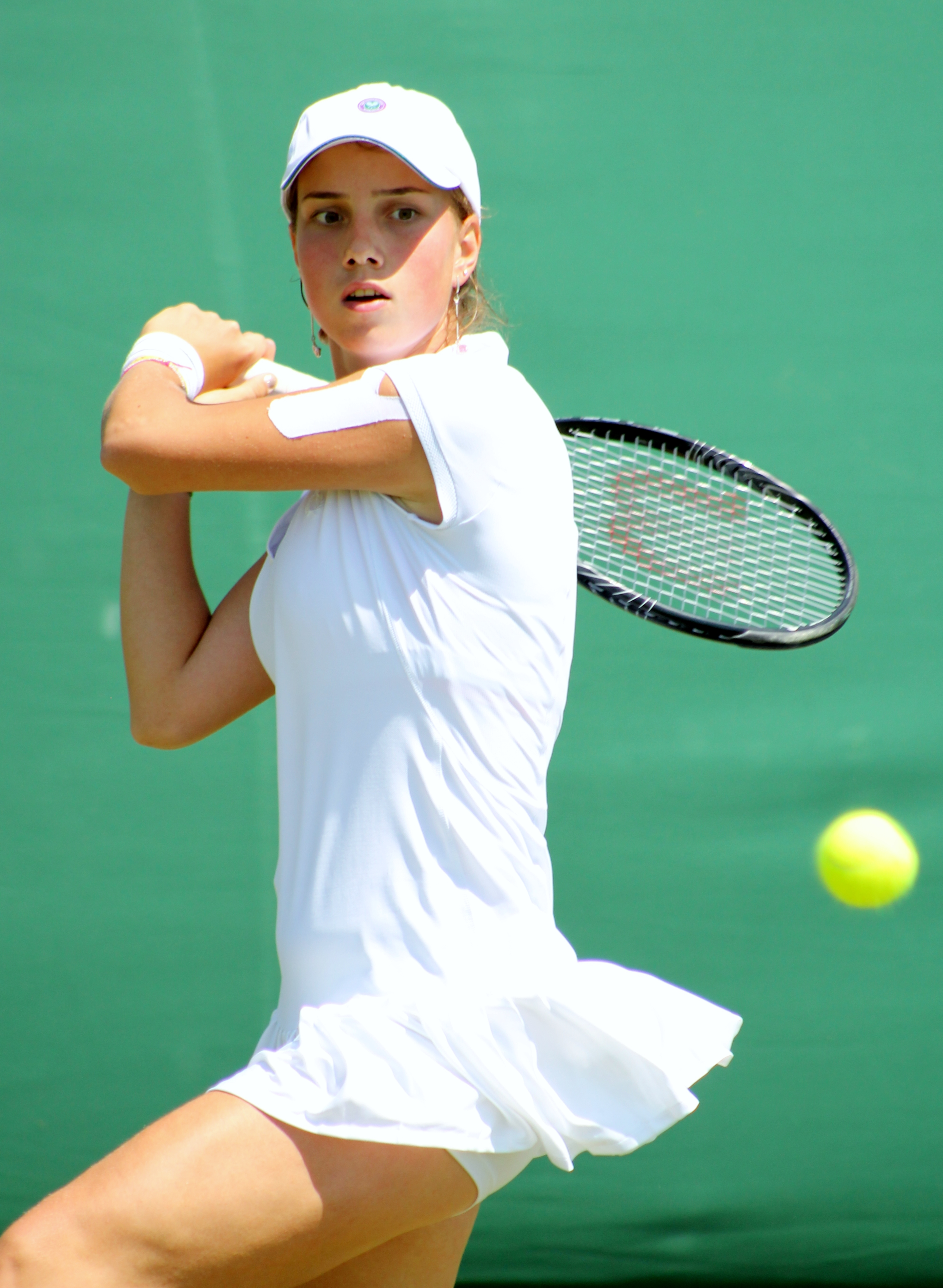 Vasylyeva WMQ14 (13)